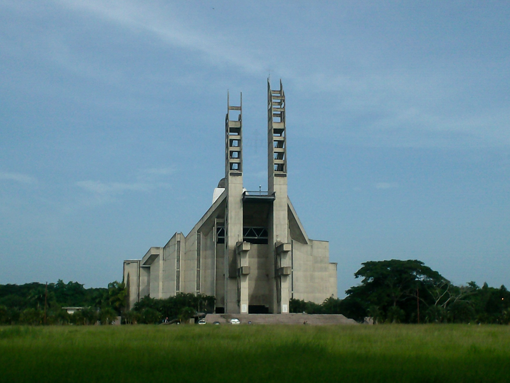 La Virgen de Nuestra Señora de Coromoto es la patrona de Venezuela. Venerada tanto en la ciudad de Guanare, donde apareció hace aproximadamente 350 años, como en todo el país. El Santuario Nacional Nuestra Señora de Coromoto, está ubicado en el Poblado Quebrada de la Virgen, sobre el sitio de aparición de la Virgen por segunda vez al cacique Coromoto, fue un proyecto realizado por el Arquitecto Erasmo Calvani en el año de 1975, la obra se inició en el año 1980. Su construcción es totalmente de concreto de obra limpia, su altura varia entre 76 y 68 metros. estructura única en el mundo, llamada doble hiperboloide elíptico. Cuenta con dos torres paralelas de aproximadamente 80 metros de altura y con un cimborrio (especie de cúpula) de 54 metros aproximadamente. En la girola se pueden admirar bellos vitrales, obra del artista Guillermo Márquez. Tiene pisos de mármol y tres altares, incluyendo al altar mayor. Se construyó totalmente en concreto obra limpiase con una estructura única en el mundo, llamada doble hiperboloide elíptico conocida también como cimborrio. Bajo el cual (en la girola) se aprecian los vitrales, obra del artista Guillermo Márquez, quien desarrolló un sistema nuevo de montajes en nervios de concreto. Fue inaugurado el 10 de Febrero de 1996 por su Santidad Juan Pablo II, quien vino a Venezuela a inaugurar y bendecir este Santuario que hace de Portuguesa y su capital, Guanare, la Capital Espiritual de Venezuela. La primera imagen que ofrece el templo desde sus vías de acceso se traduce en una maravillosa e impresionante experiencia para el viajero.